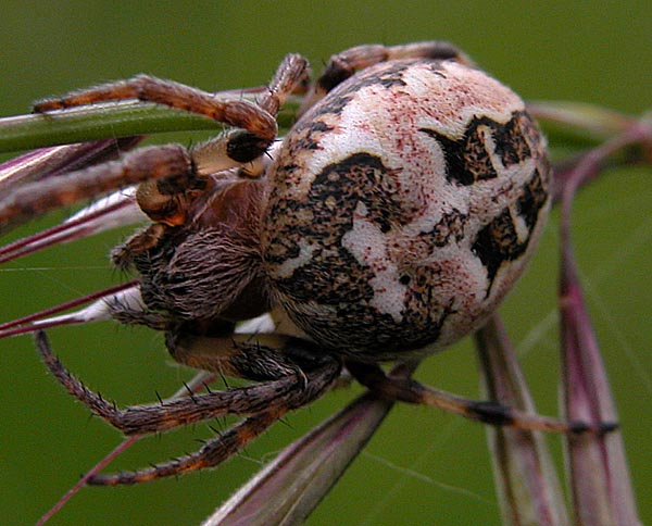 Schilfradspinne (larinioides cornutus), aufgenommen auf einer Wiese am Hornberg in Buseck